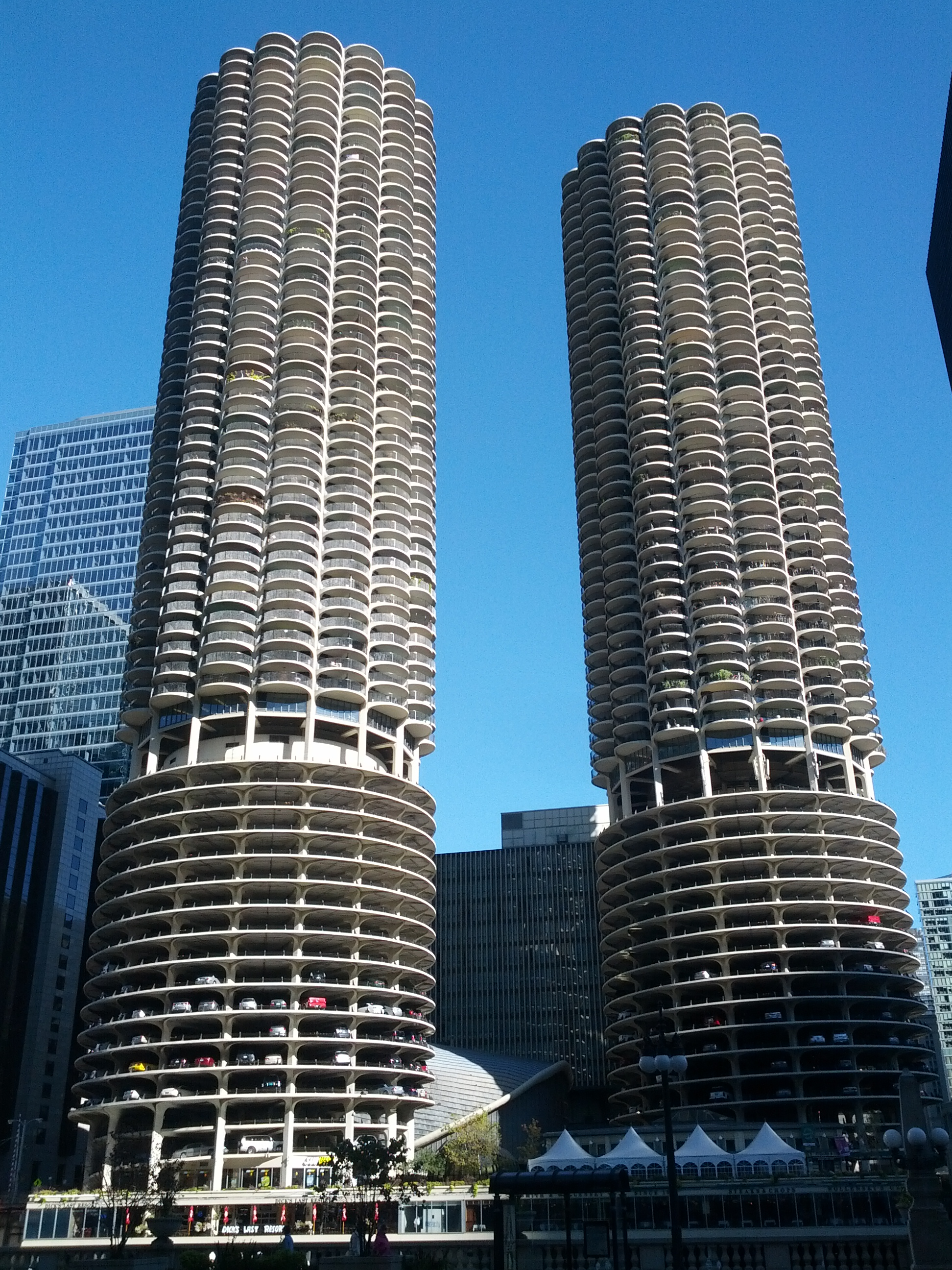 Architect Bertrand Goldberg